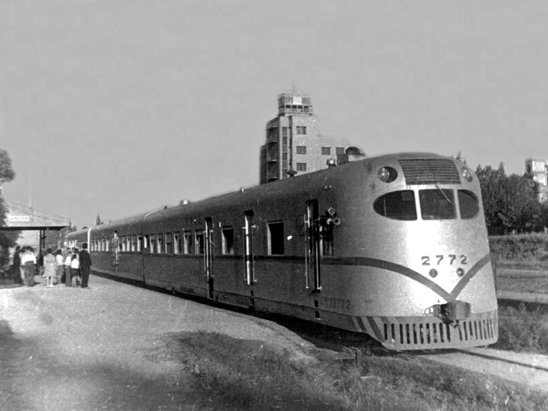 Coche Motor Ganz Tipo Catamarca.